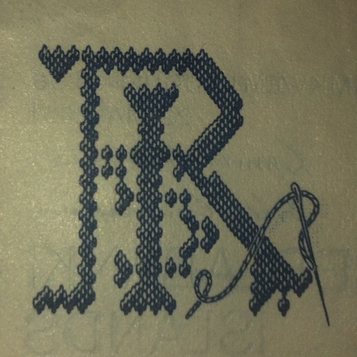 Fangamark Ragnheiðar Jónsdóttur